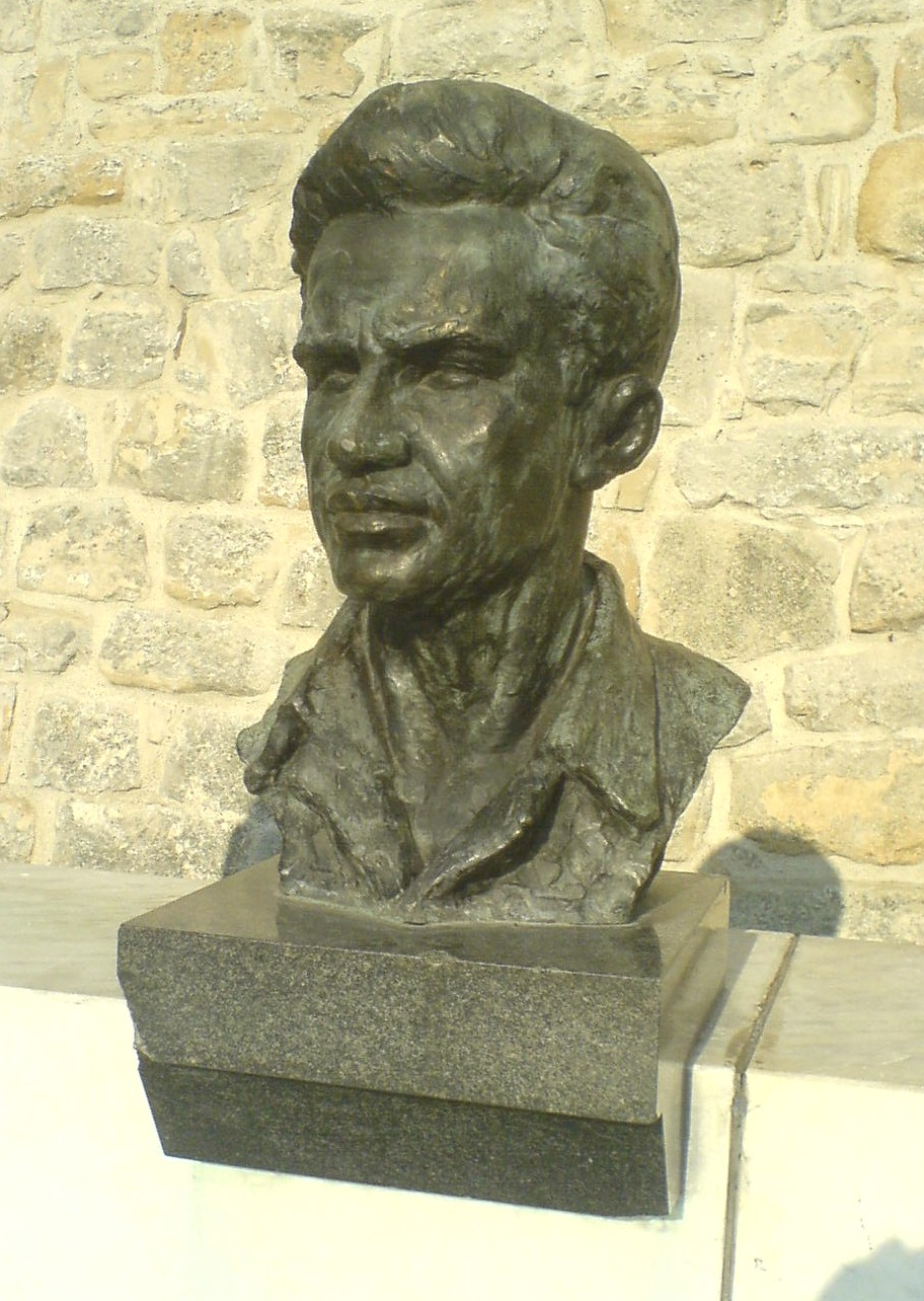 Bista Ive Lole Ribara na Kalemegdanu.